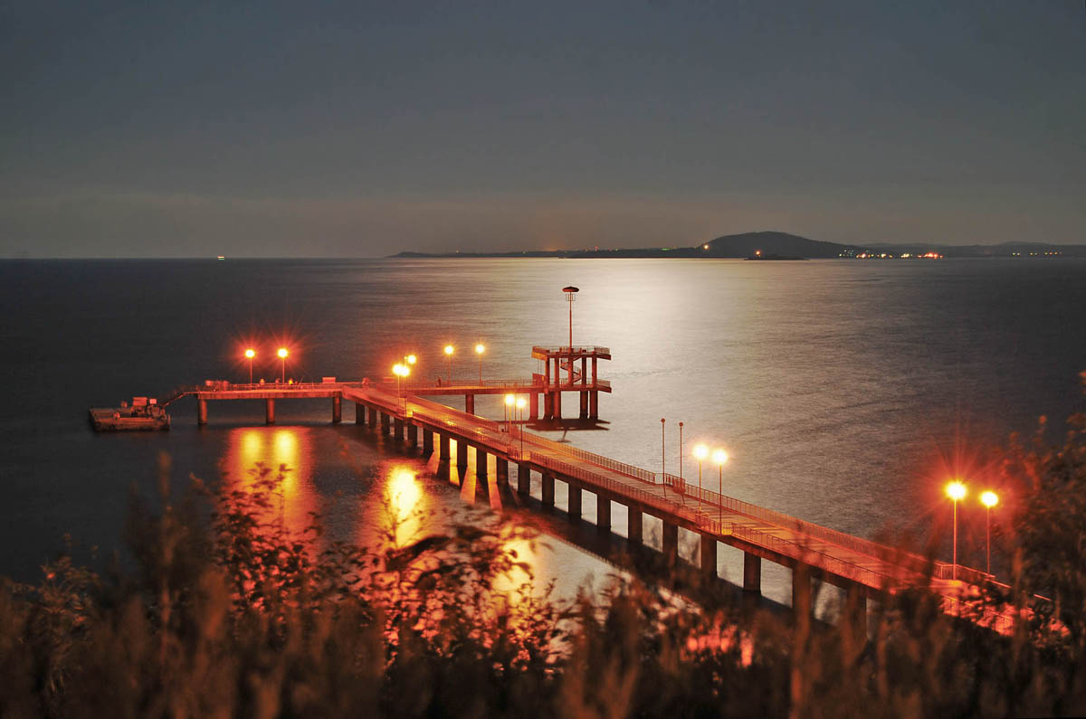 Бургаският залив и мостът през нощта